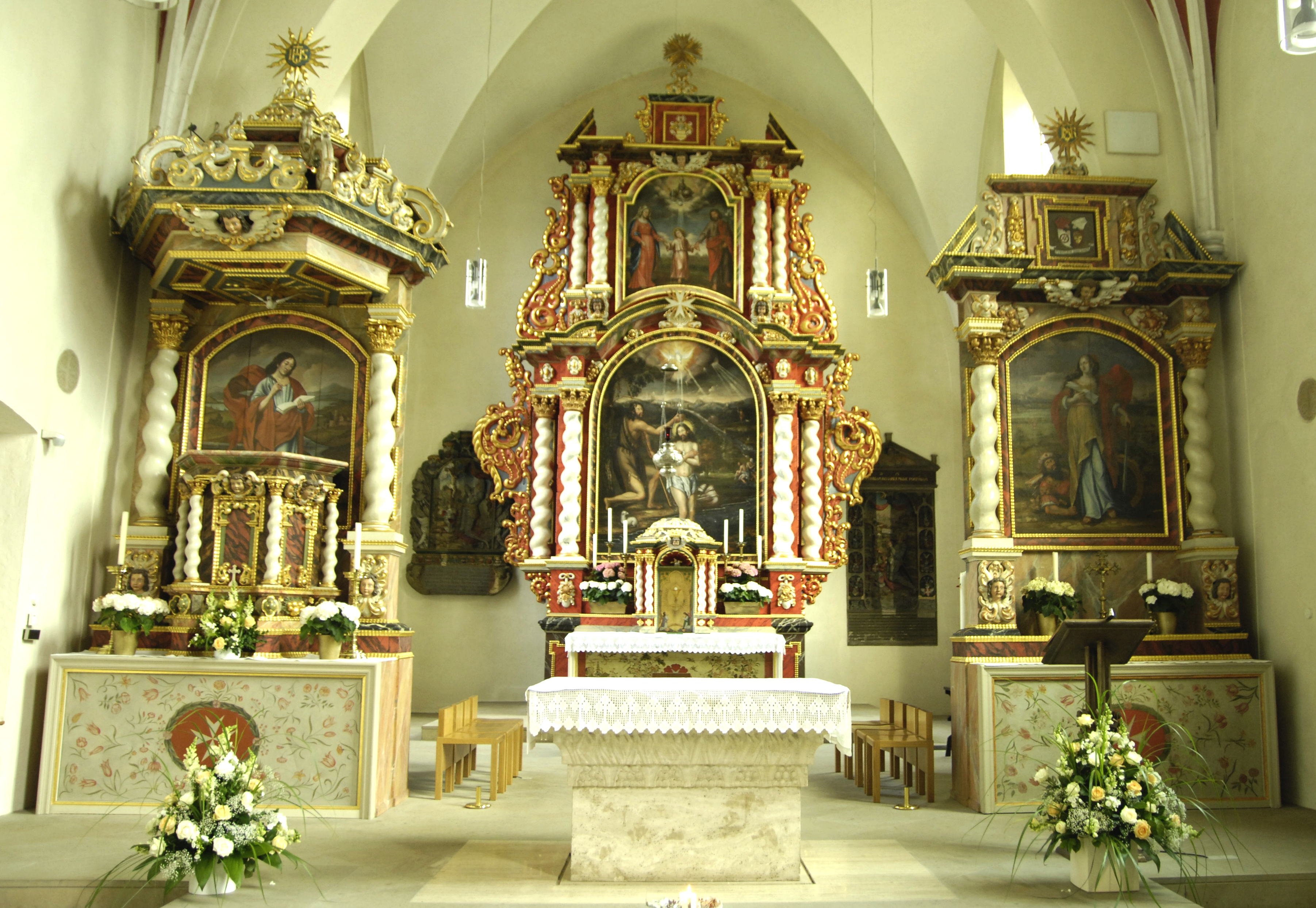 Lage-Rieste, Inneres der Wallfahrtskirche